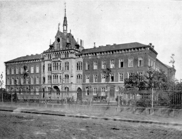 St. Johannes-Hospital, Kölnstraße 54, Bonn